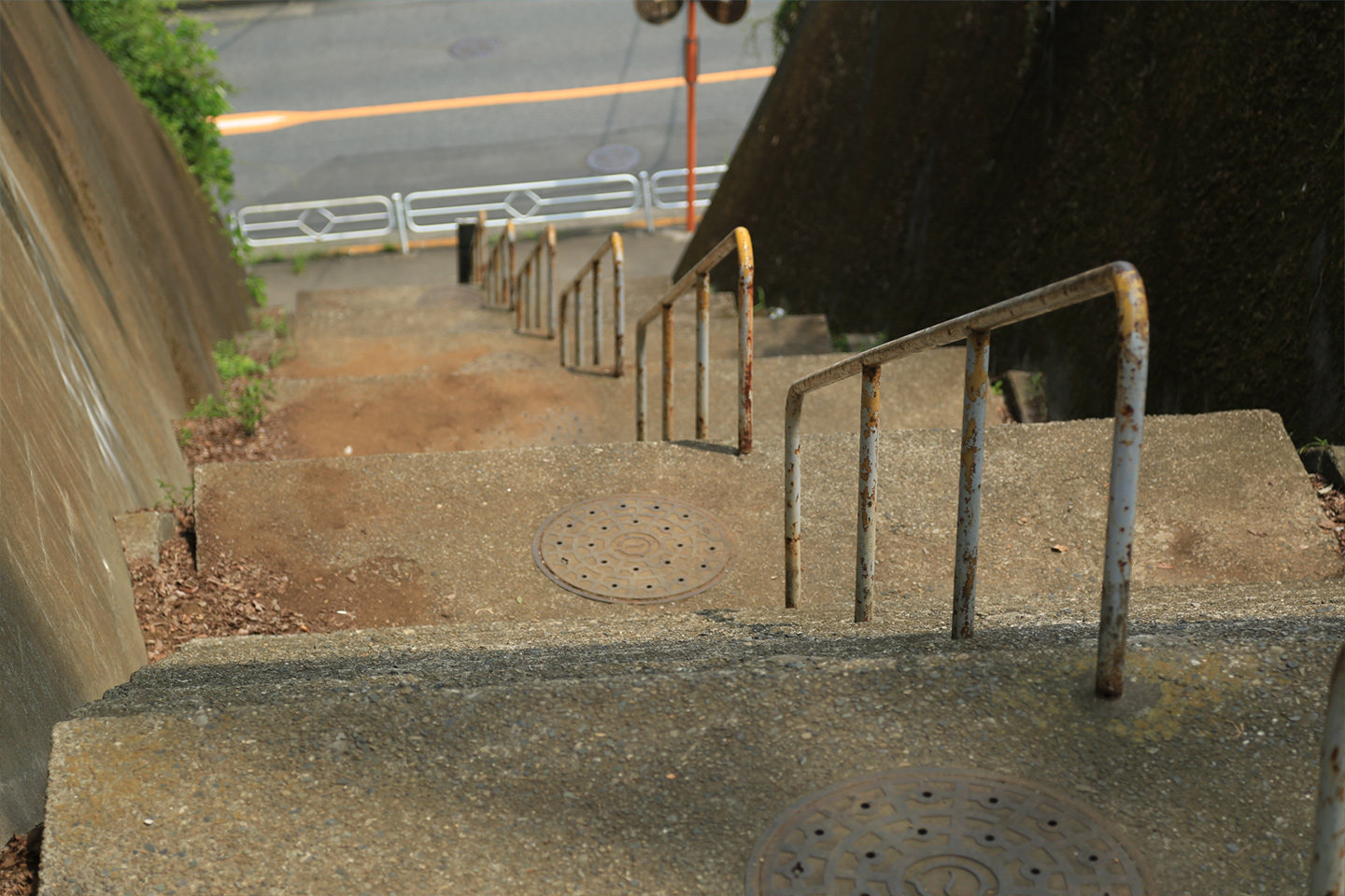 日野市神明の大階段。